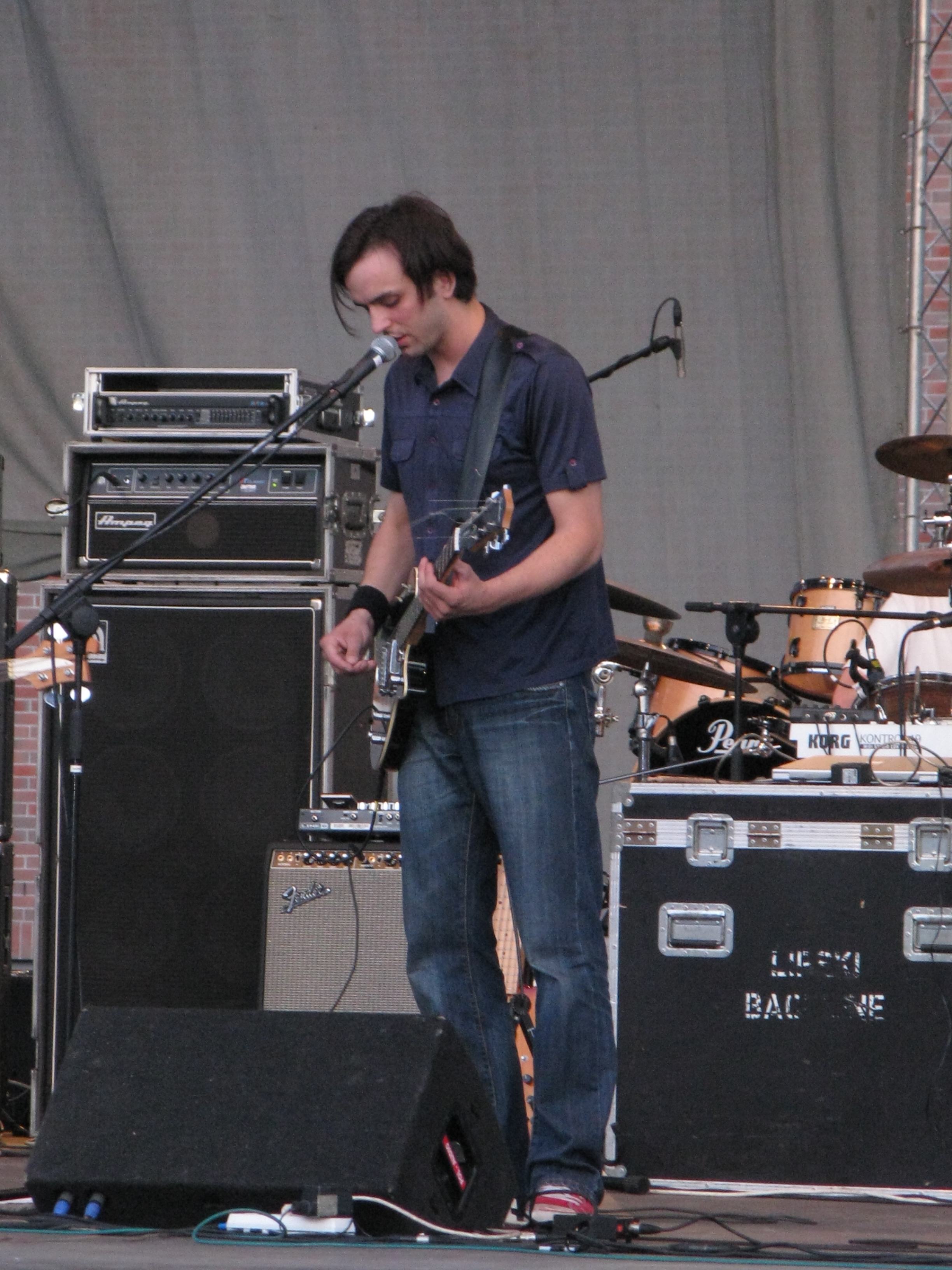 Wojciech Kotwicki, wokalista zespołu pl:3moonboys na koncercie w Toruniu